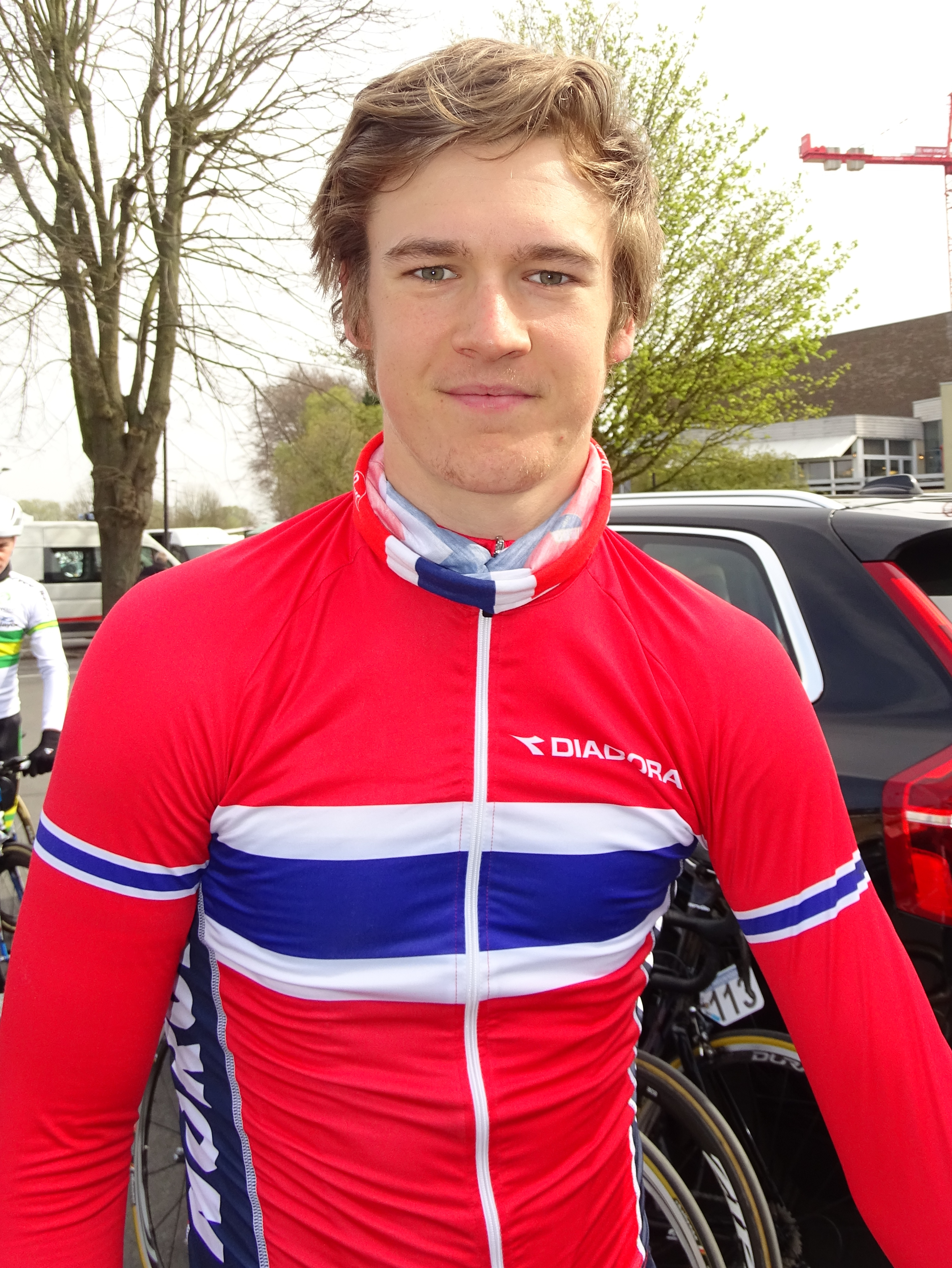 Reportage réalisé le samedi 9 avril à l'occasion du départ et de l'arrivée du Tour des Flandres espoirs 2016 à Audenarde, Belgique.